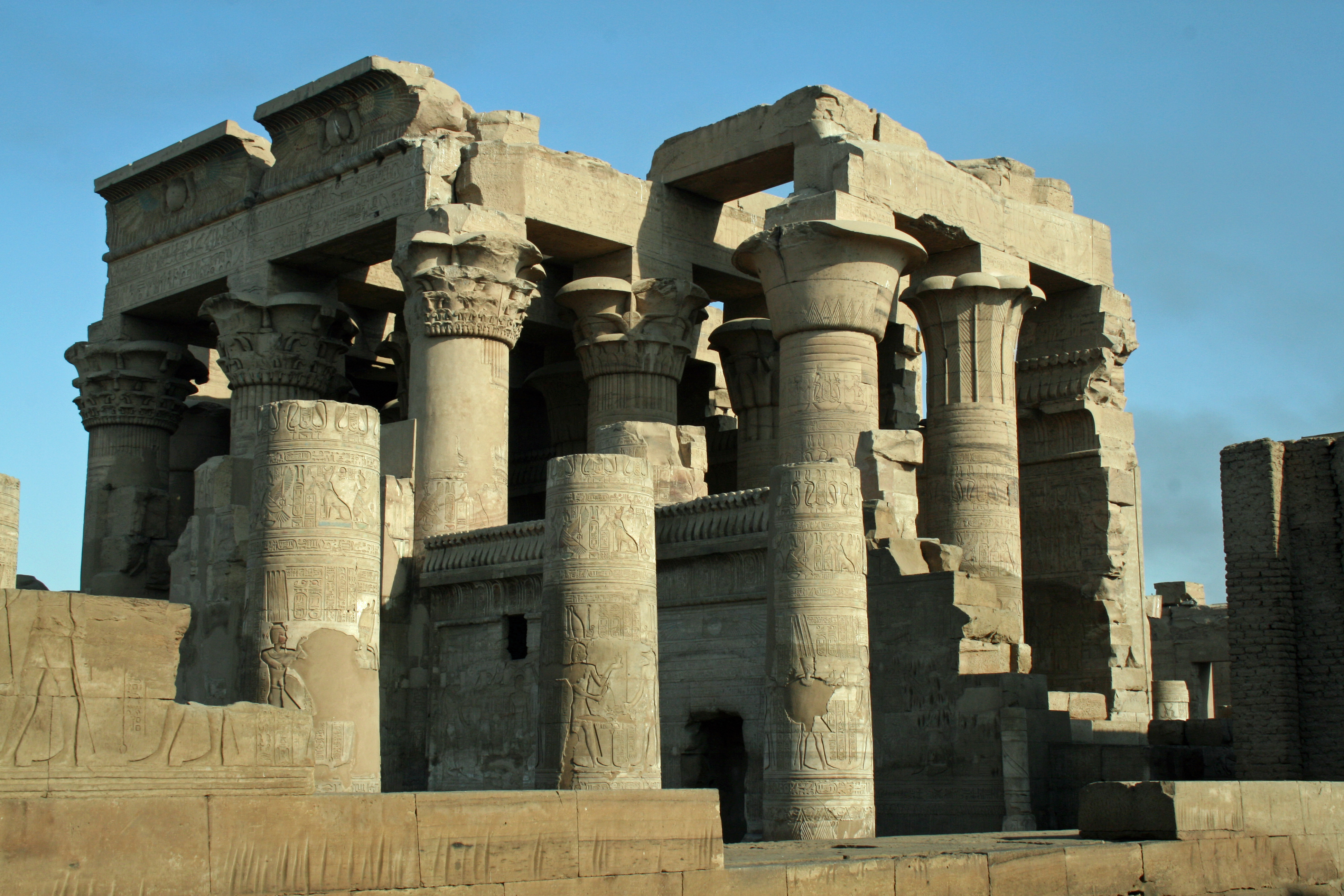 Temple de Kôm Ombo